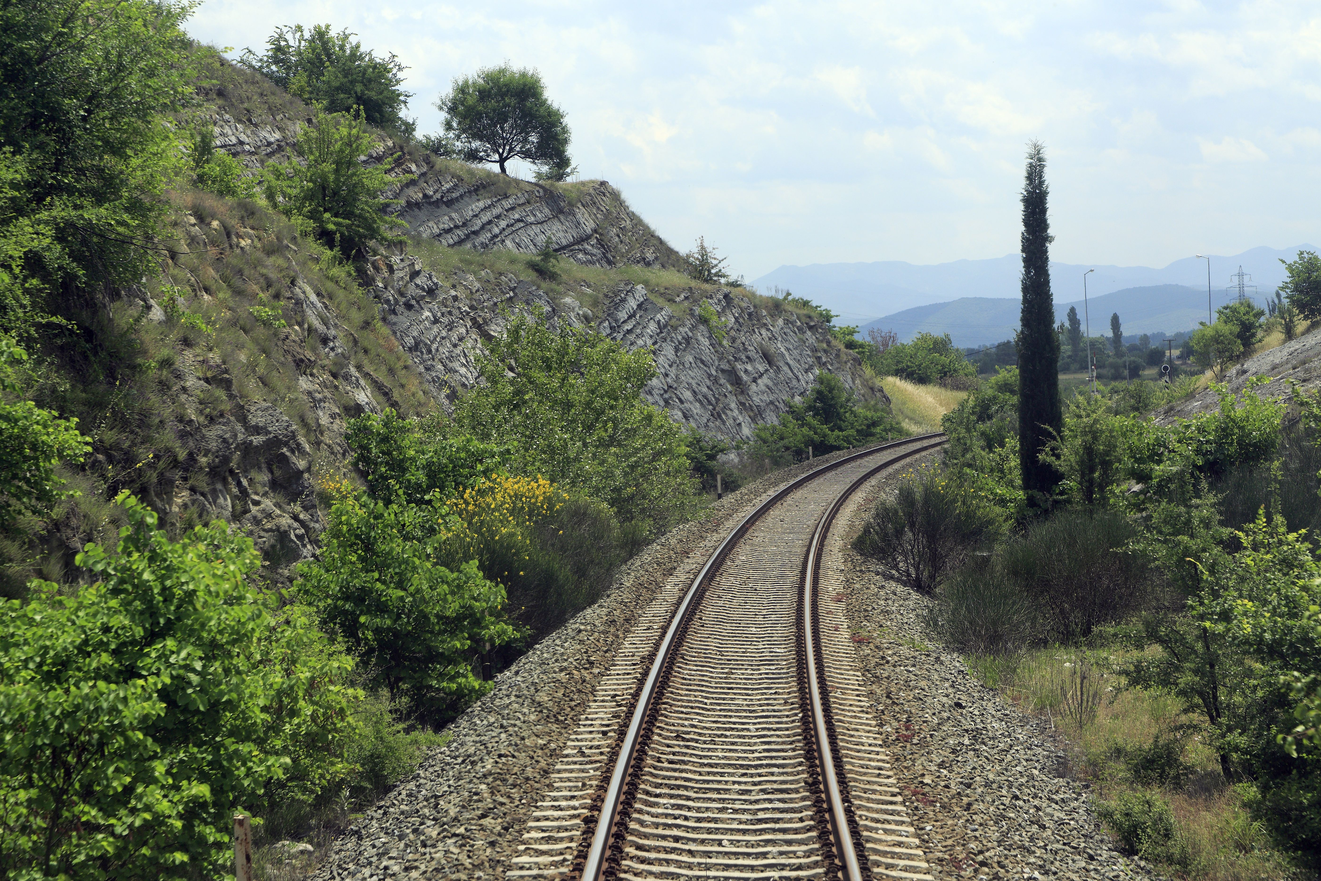 Viele Vegetationspflegearbeiten werden nicht durchgeführt. Die Vegetation wächst langsam in die Bettung hinein.